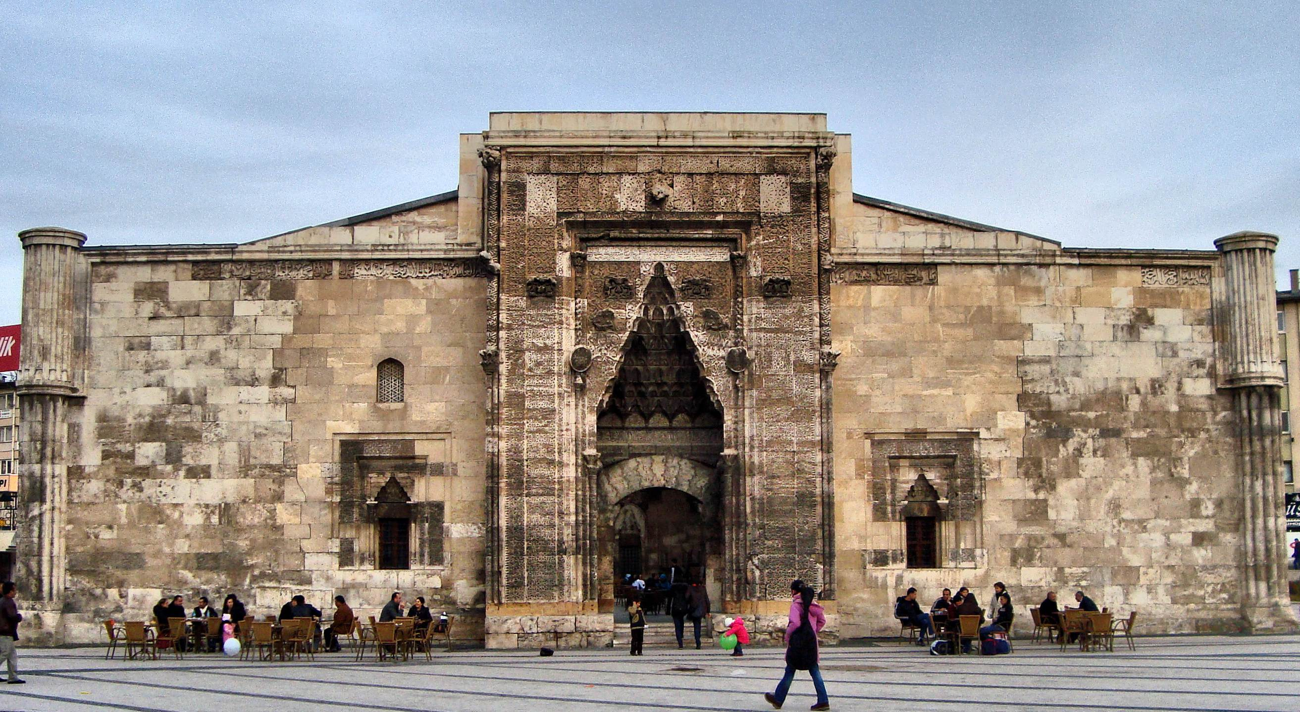 Buruciye medresesi-SİVAS